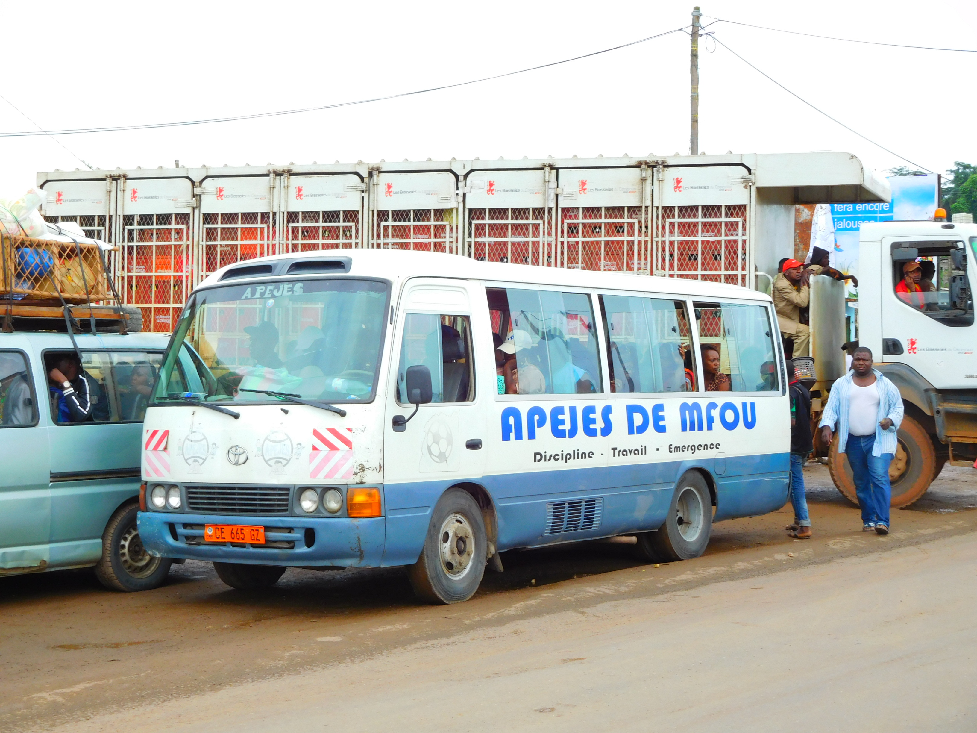 Bus à Boumnyébel (Nyong-et-Kéllé, Cameroun)